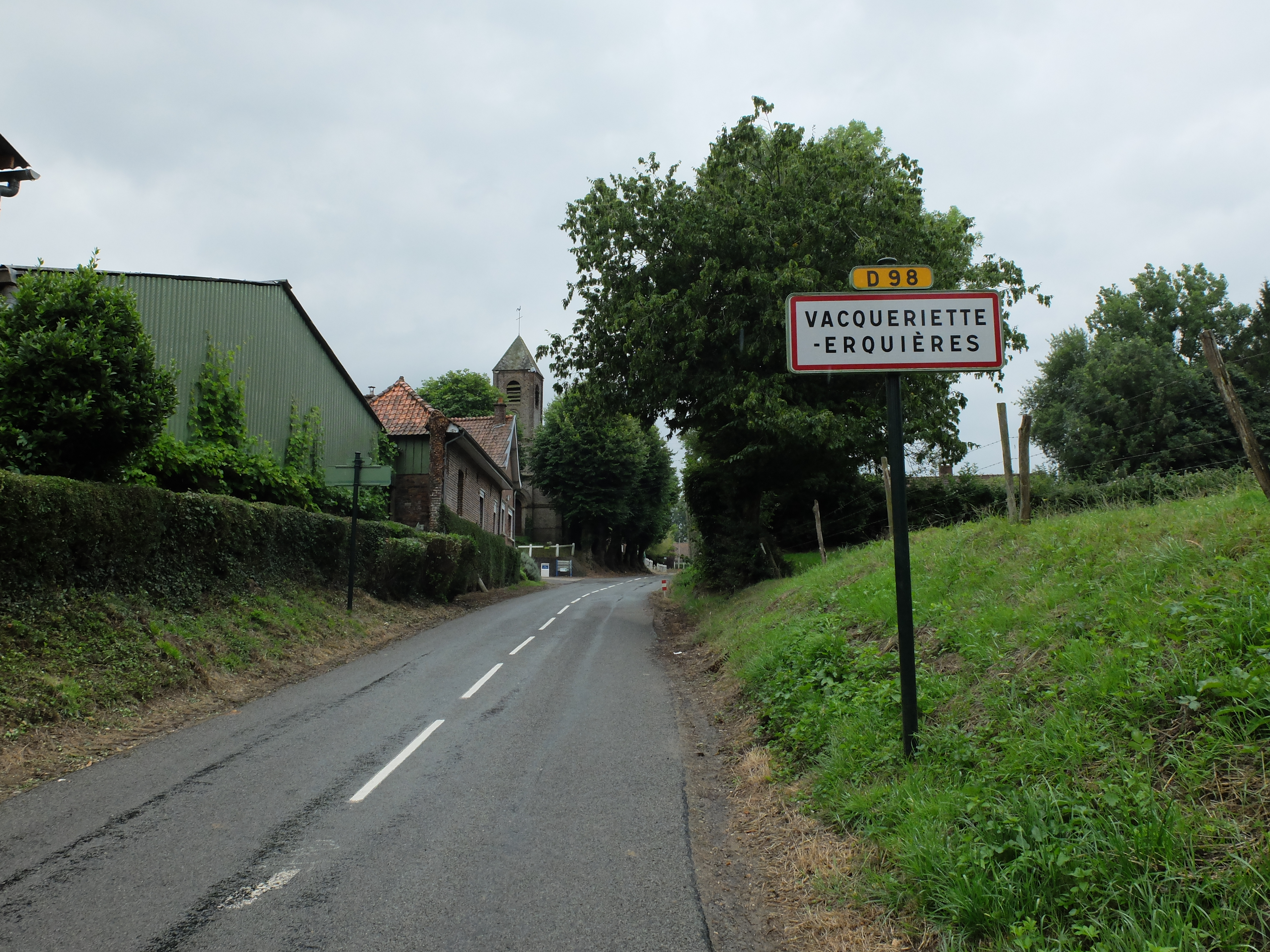 Vue de Vacqueriette-Erquières depuis l'entrée d'hier. L'église Saint-Firmin est visible.